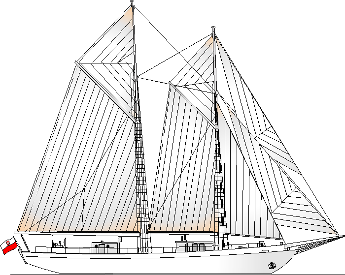 s/v 'Janek Krasicki' , Gdynia